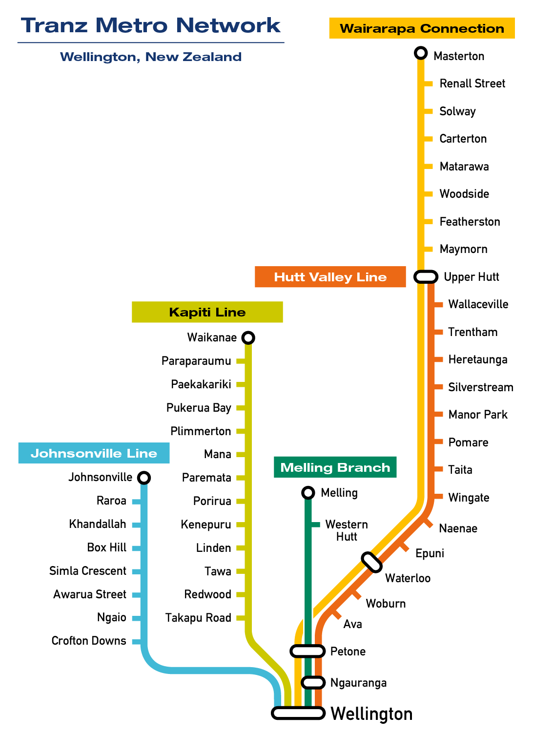 Network map of the Tranz Metro system in Wellington, New Zealand